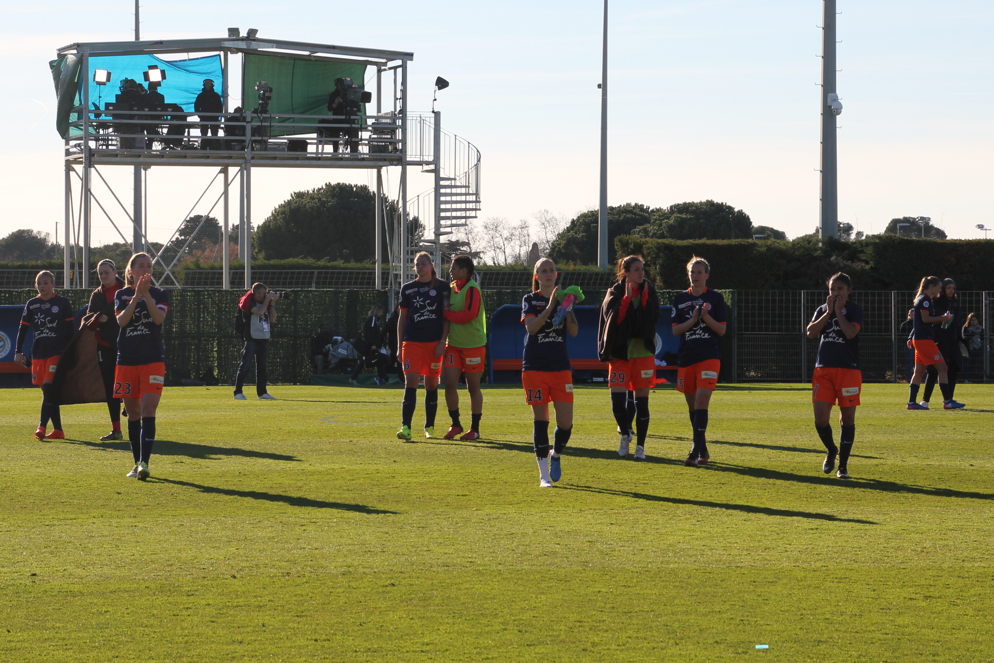 Effectif du Montpellier HSC féminin, lors du match de championnat de D1 contre l'Olympique Lyonnais